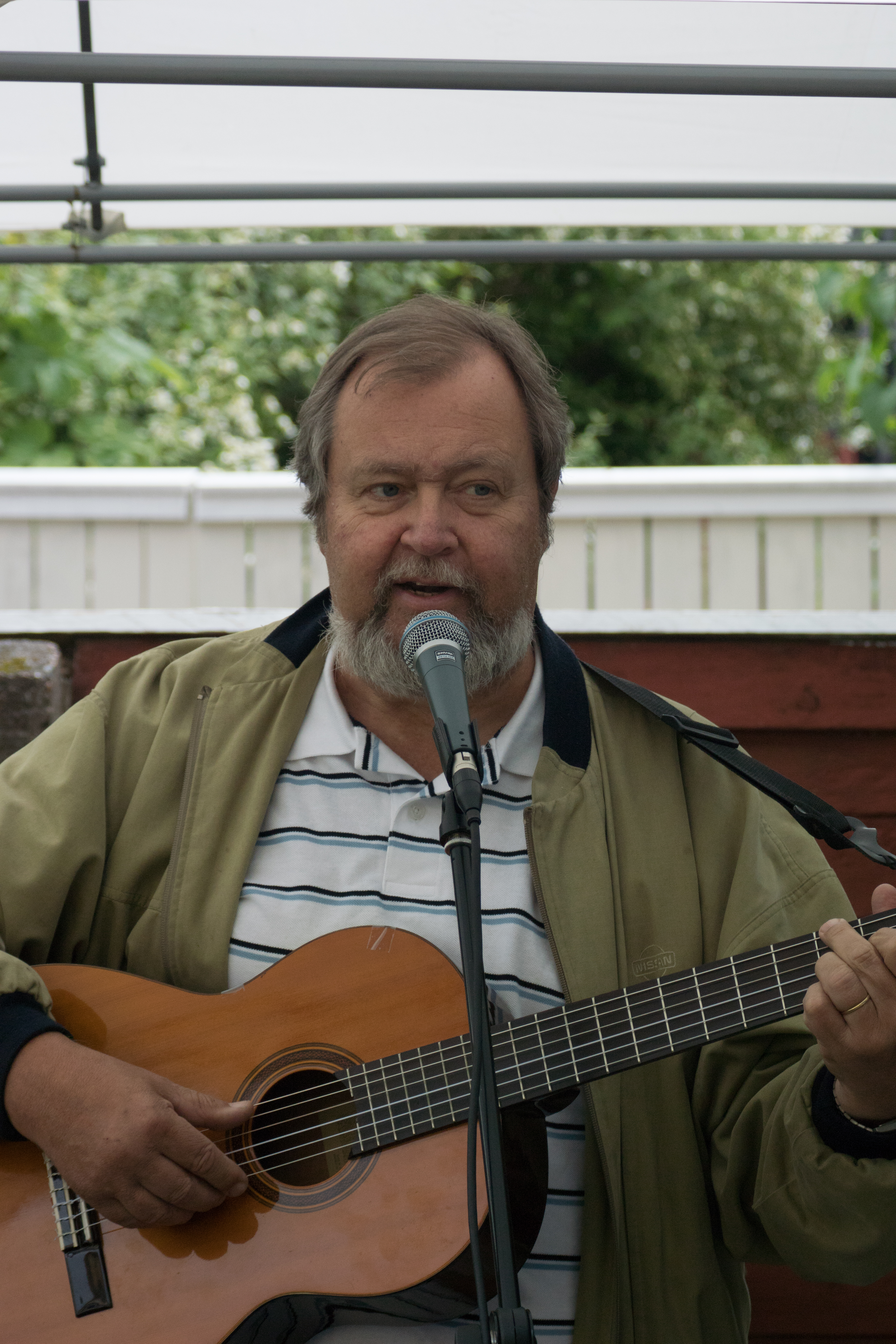 Lasse von Hertzen suomalainen laulaja